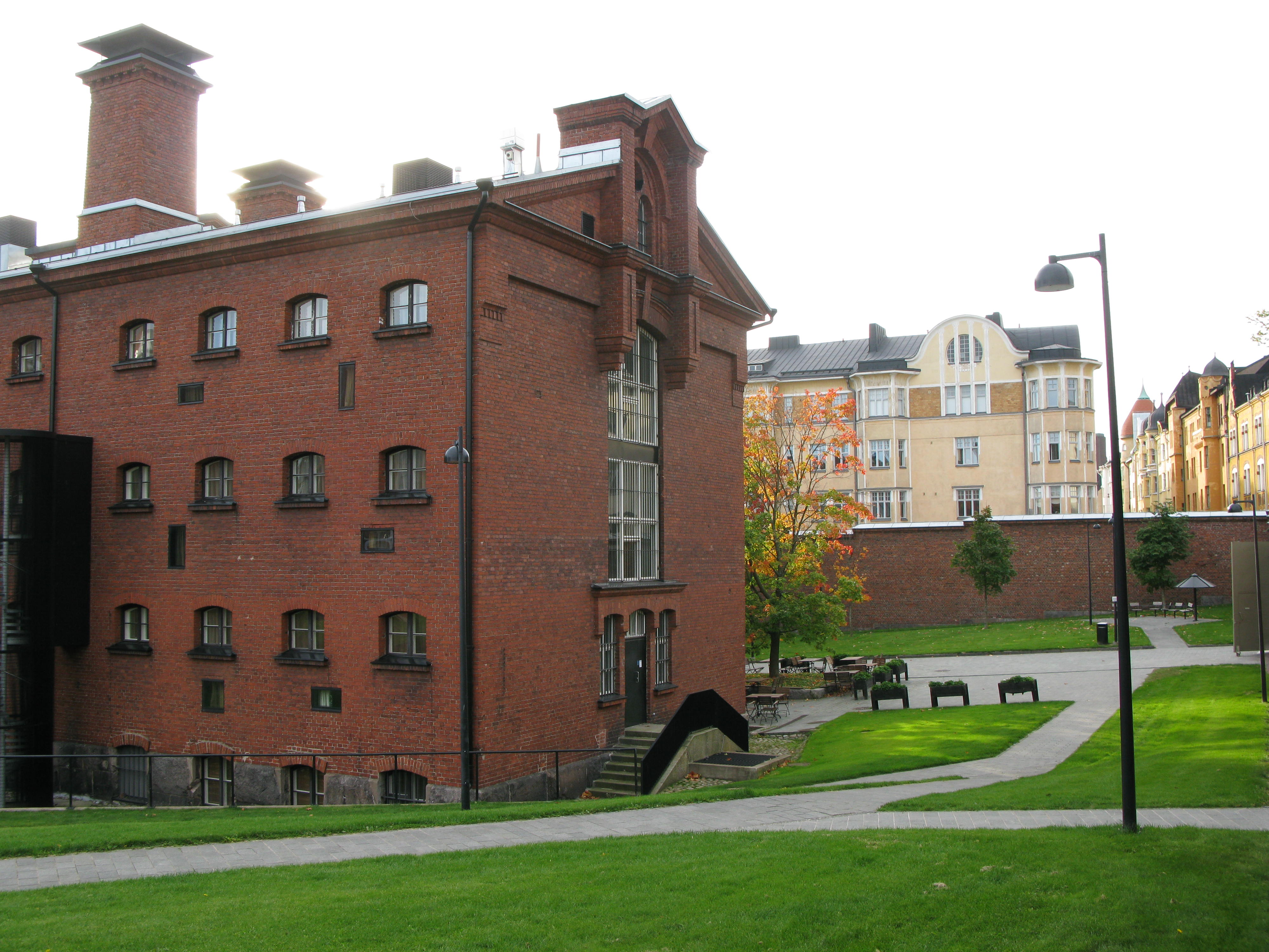 Entinen lääninvankila on muutettu hotelliksi.